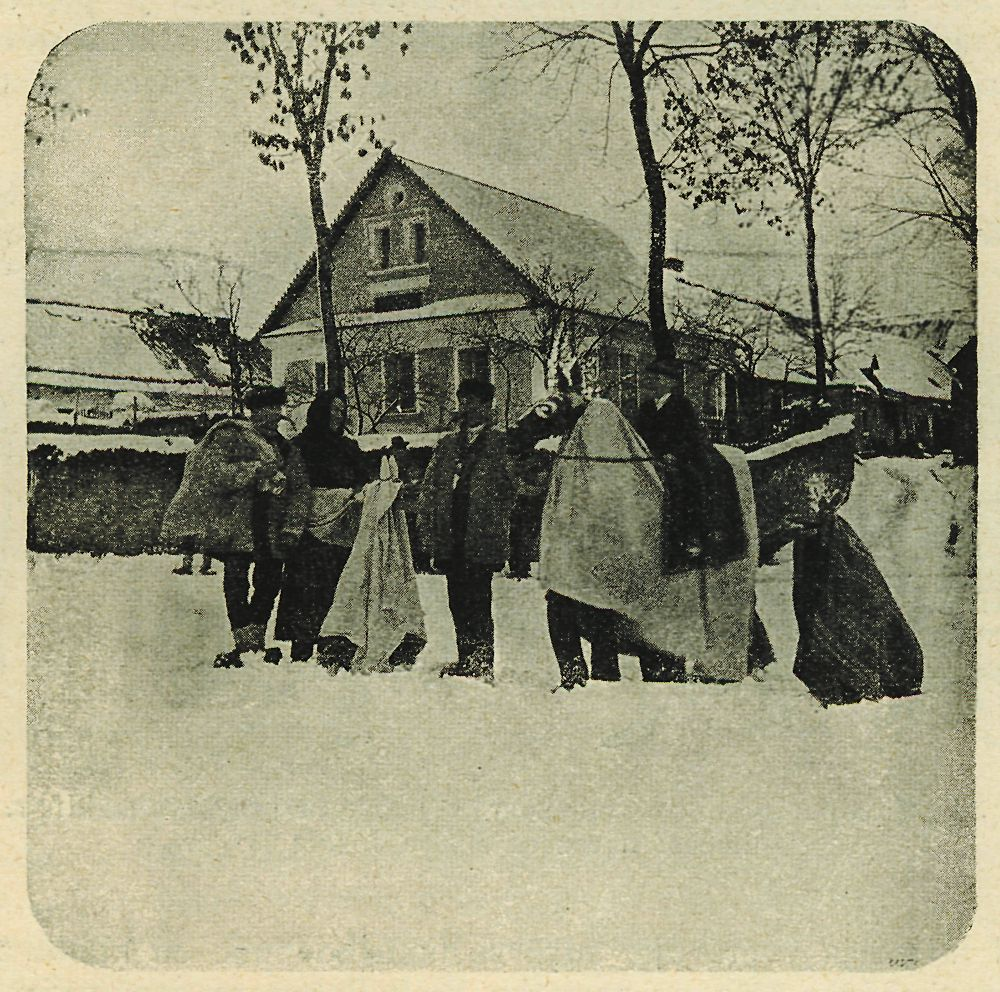 «Кобыла» в Печёвой Льхоте (Pechova Lhota)